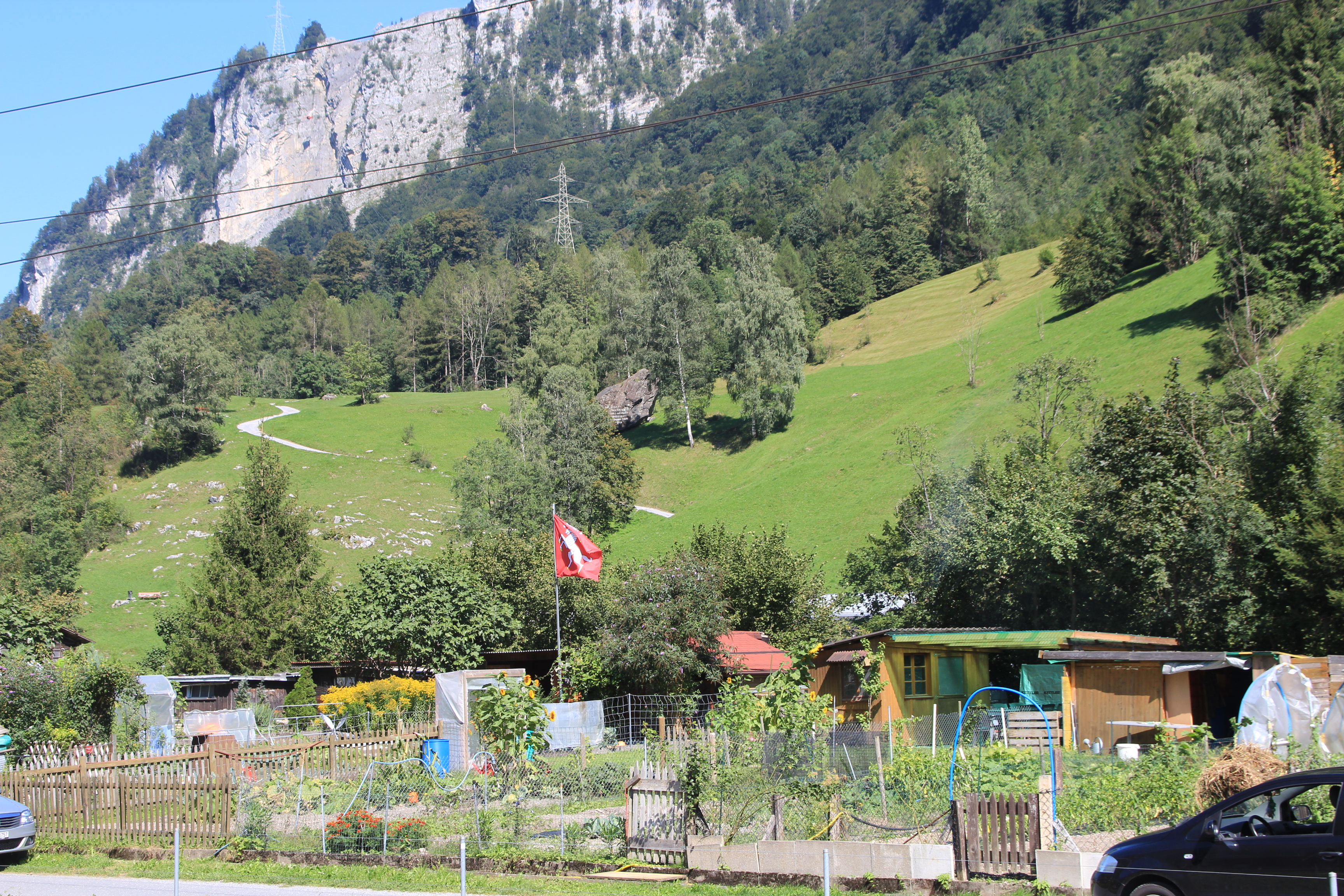 Schlattstein